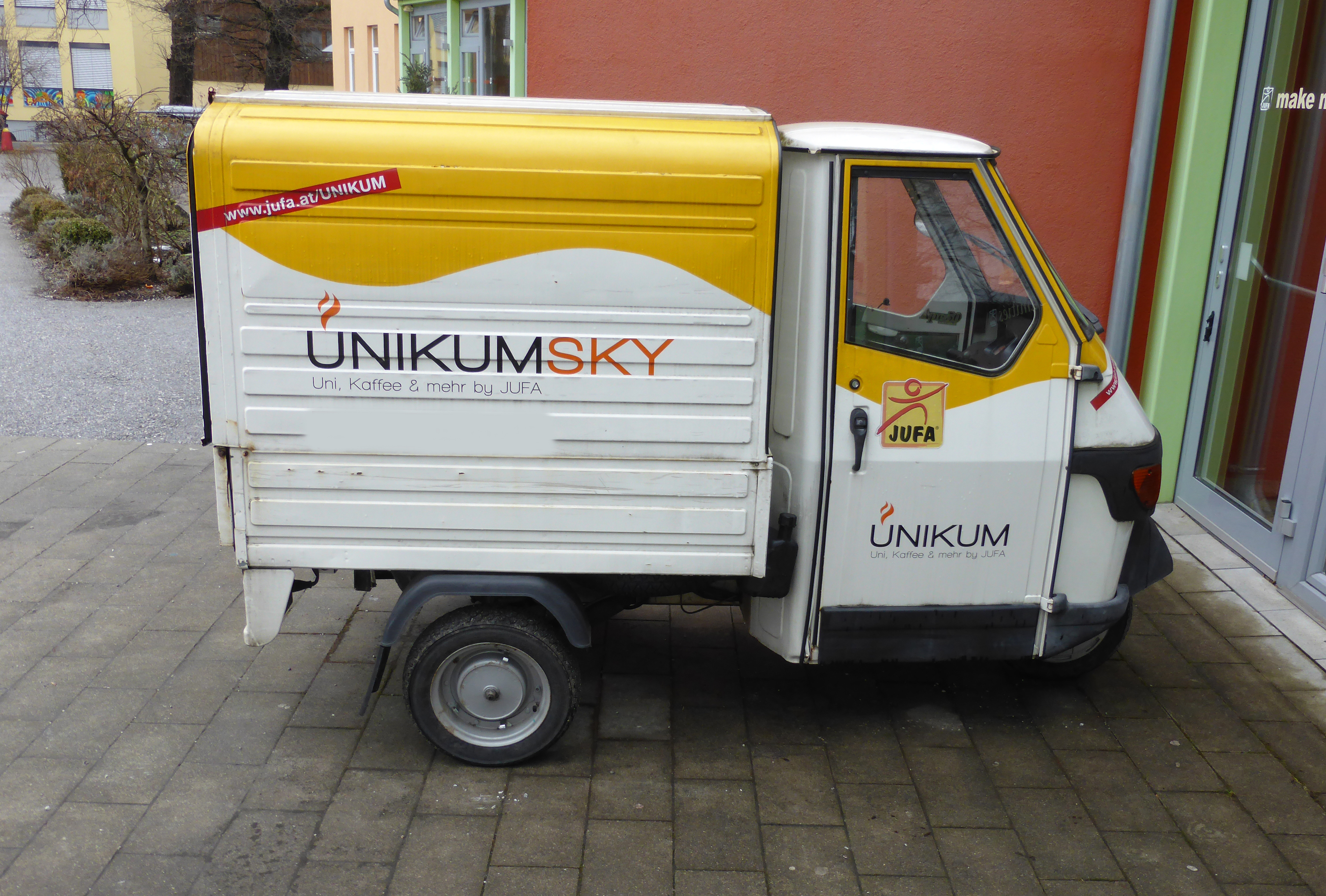 Ape 50 bei der AdminCon 2017.